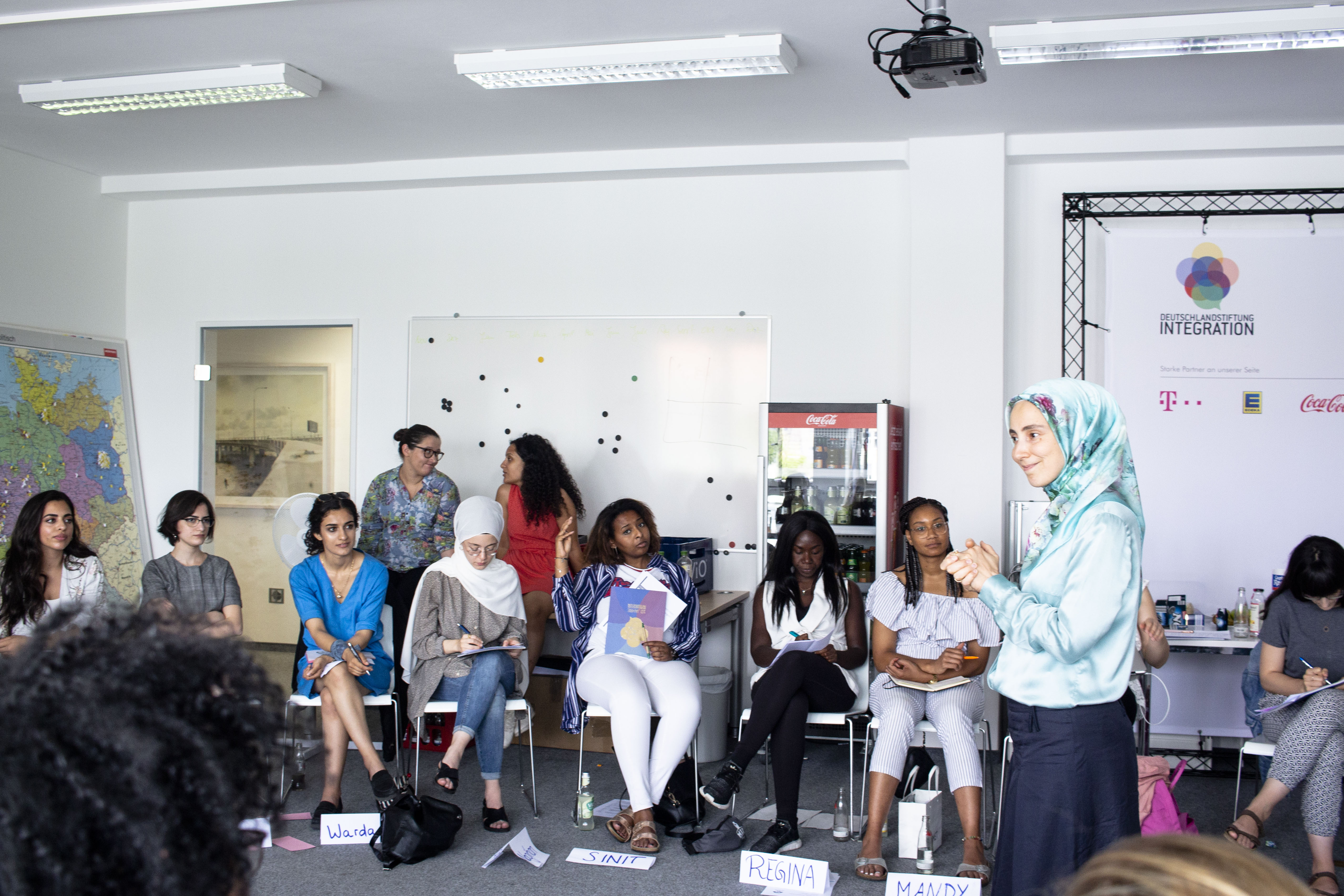 SWANS-Intiative: Zur Förderung gehören auch Schulungen rund um das Thema Berufseinstieg an